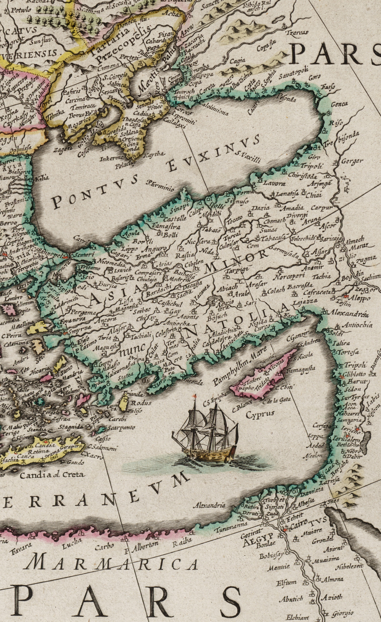 title=Europa recens Descripta;size=41x55 cm